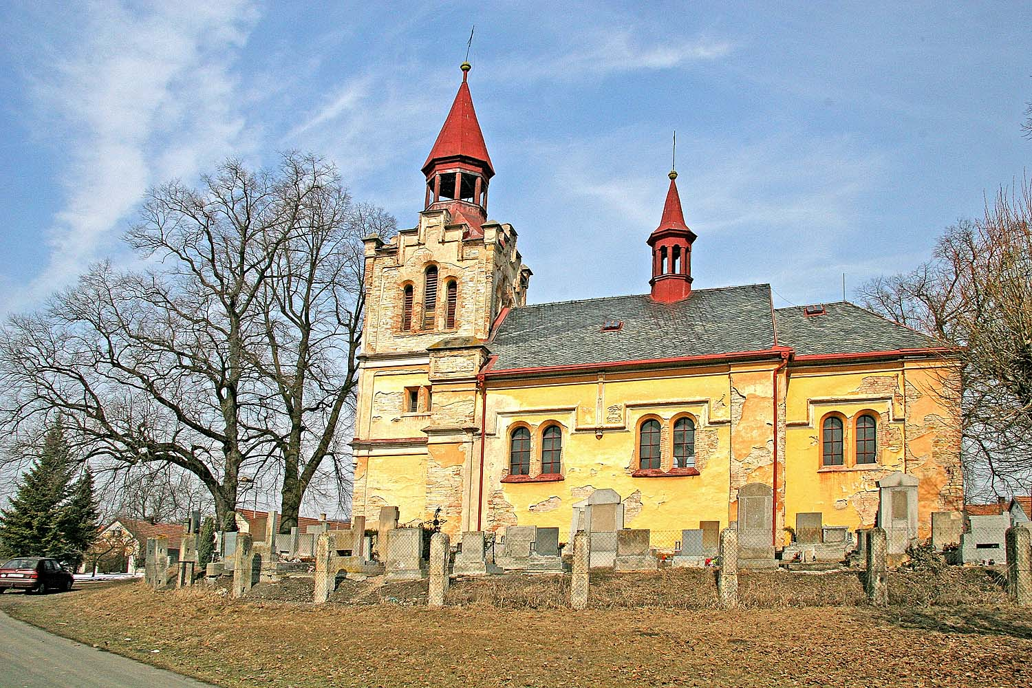 Kostel Narození Panny Marie v Choťovicích, district Nymburk autor: Prazak date: 24. 3. 2006